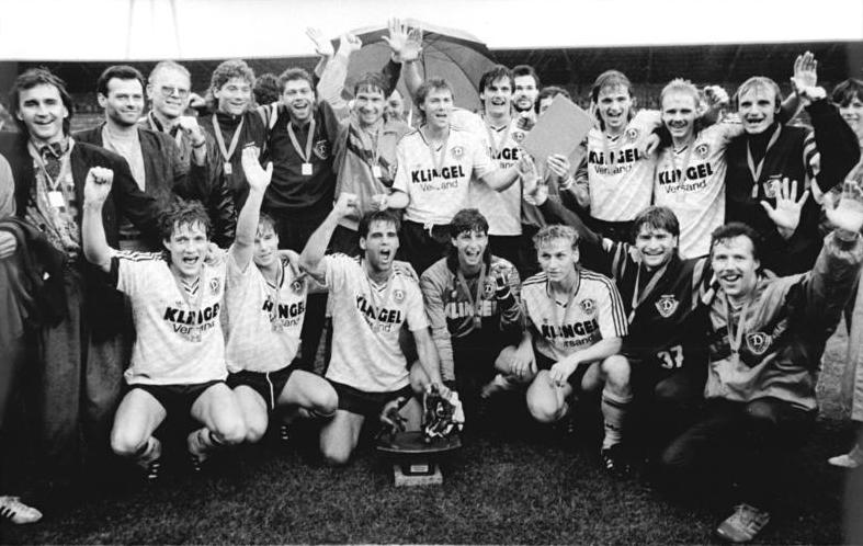 ADN-Settnik-2.6.90- Berlin: Fußball-Pokalfinale 1. FC Dynamo Dresden - PSV Schwerin 2:1 Große Freude bei Dynamo über den siebenten Pokalsieg. Der DDR-Meister aus Dresden konnte sich vor 5.700 Zuschauern im Jahn-Sportpark gegen die stark aufspielenden Schweriner mit 2:1 durchsetzen.